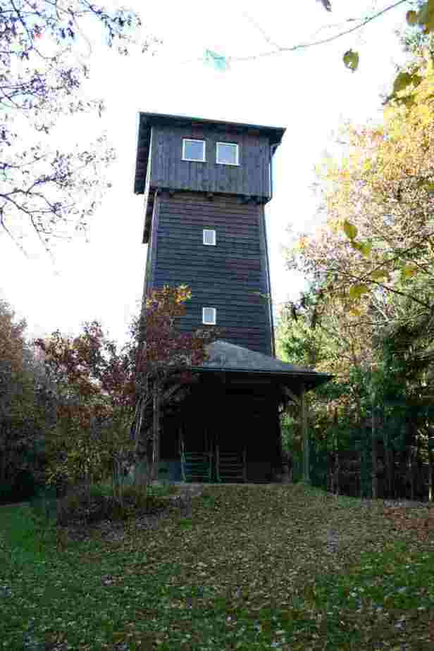 Wallburgturm auf dem 482m hohen Weilenscheid